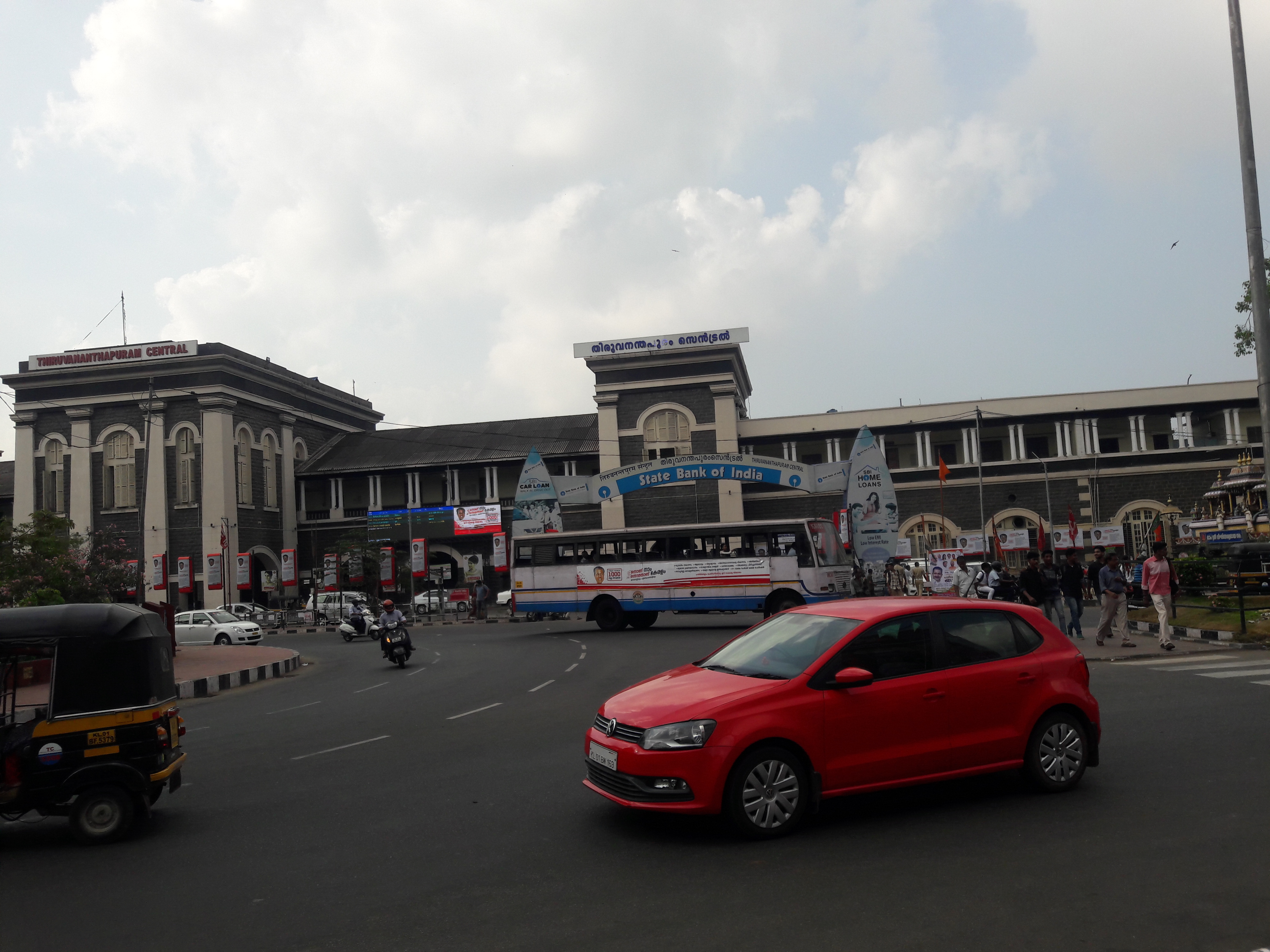 തിരുവനന്തപുരം സെൻട്രൽ തീവണ്ടിനിലയം